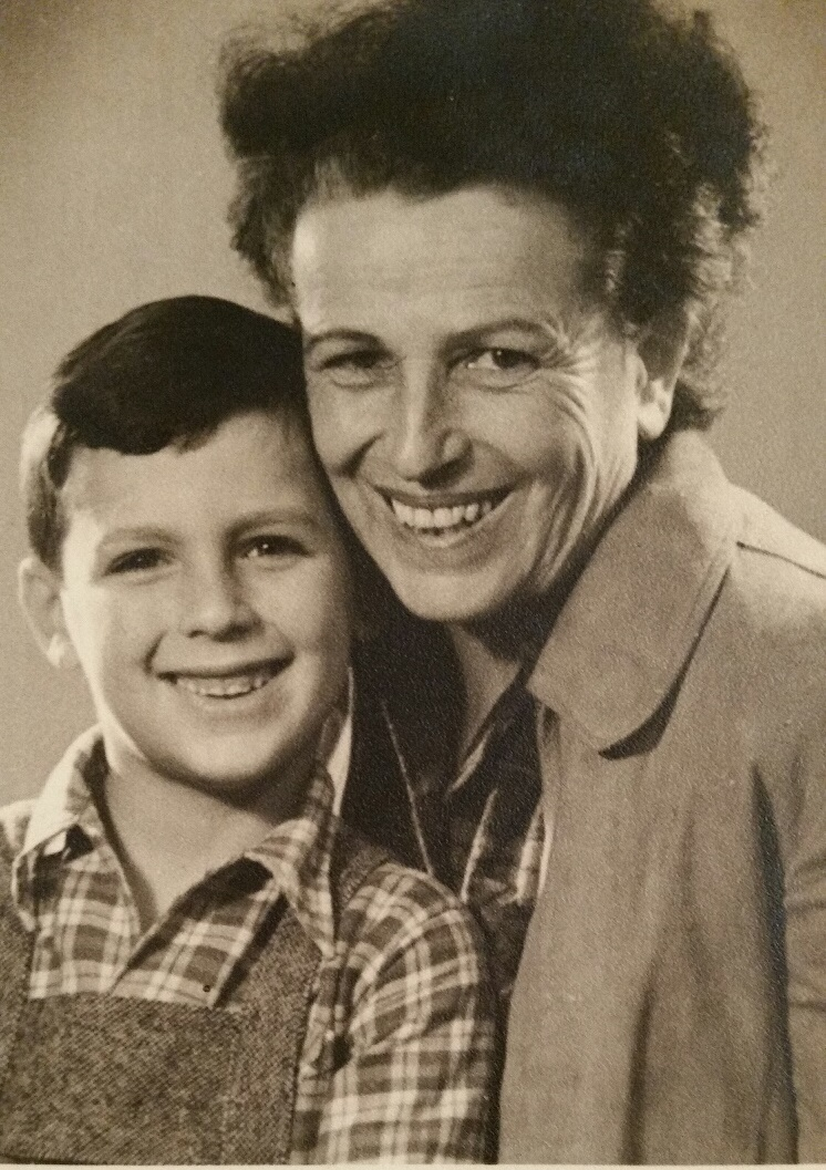 גורית קדמן עם נכדה הבכור גדעון